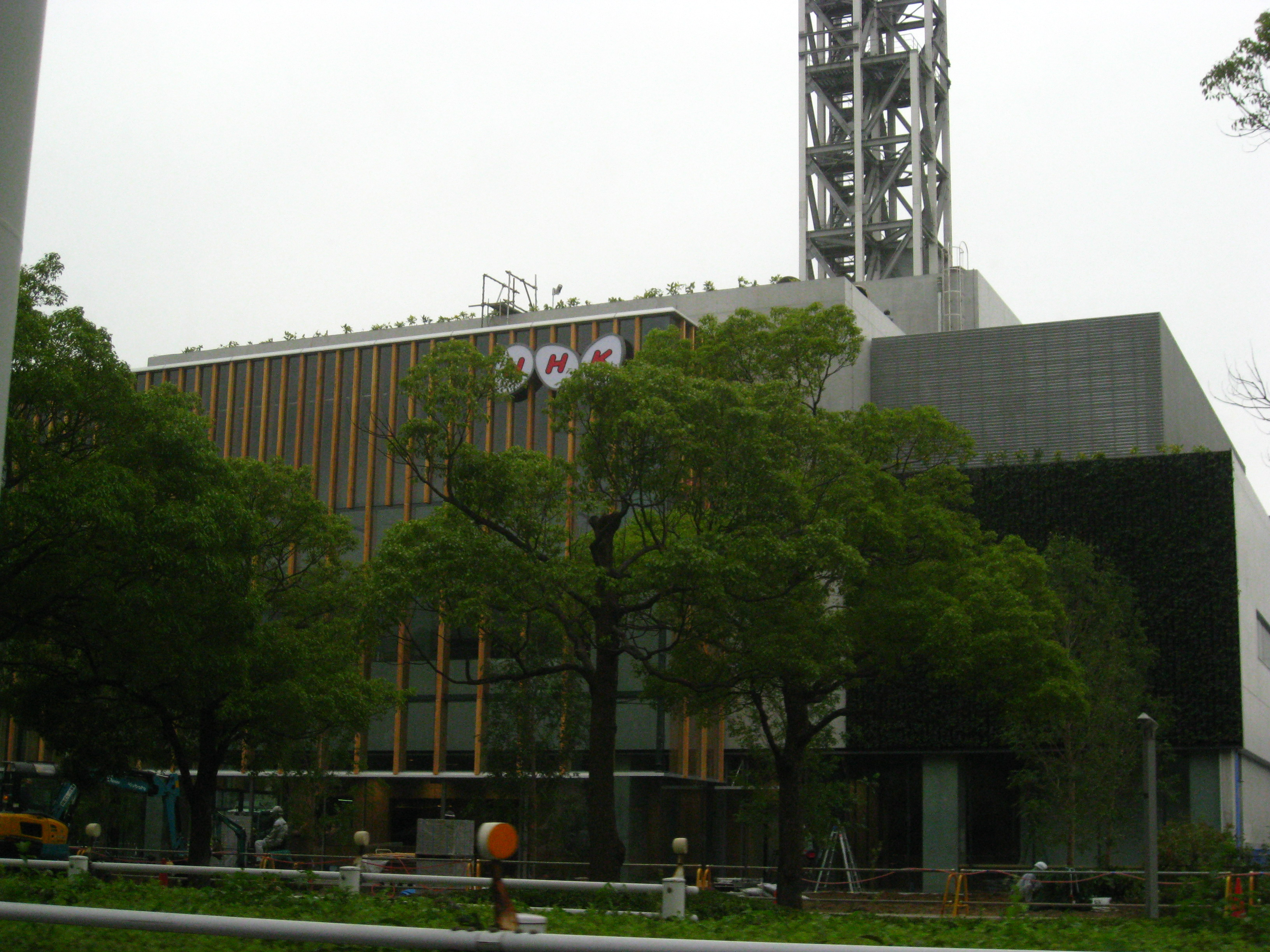 建設途中のNHK千葉放送局新局舎です